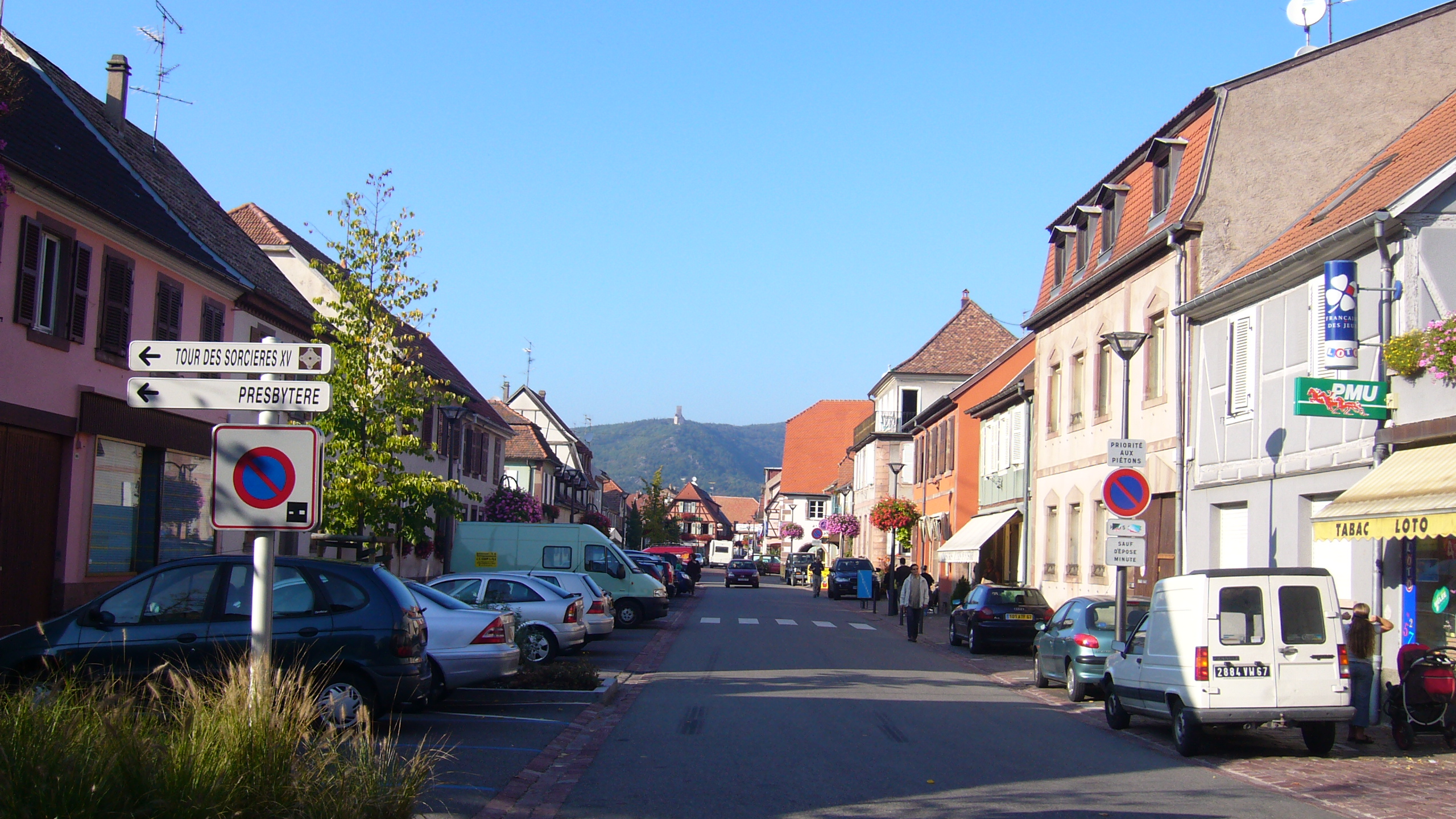 L'artère principal de Châtenois